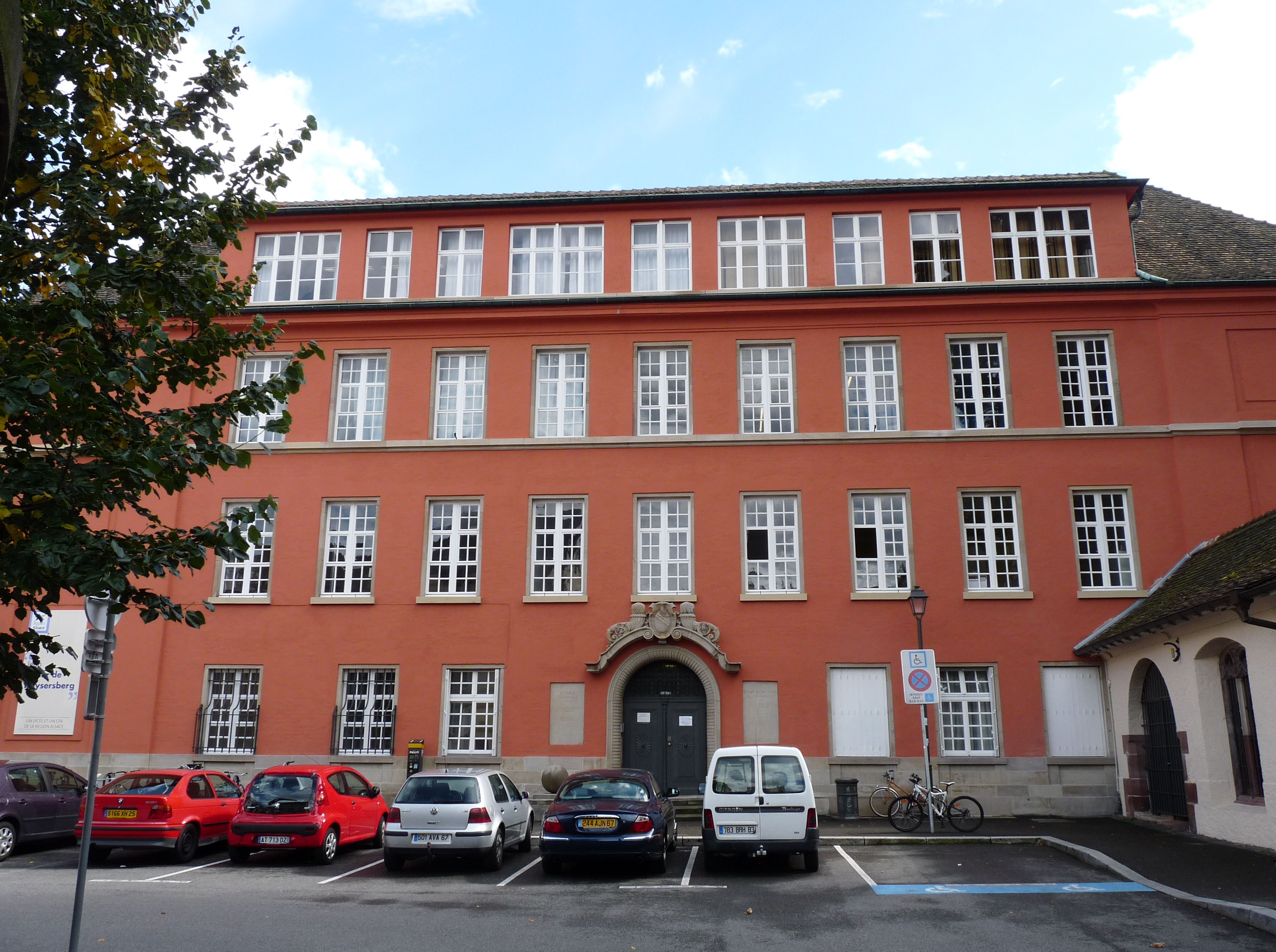 Lycée Jean Geiler (14, rue des Bateliers, Strasbourg)